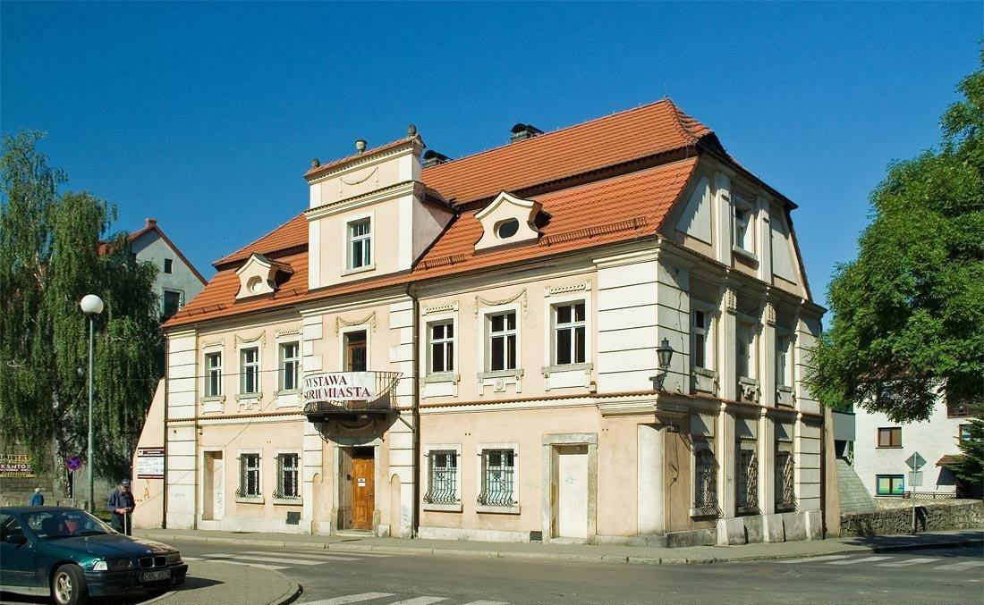 Bolesławiec, ul Kutuzowa 14 - dom mieszkalny (dom w którym zmarł Kutuzow), obecnie Dział Historii Miasta Muzeum Ceramiki (zabytek nr 1256 z dn. 26.03.65)